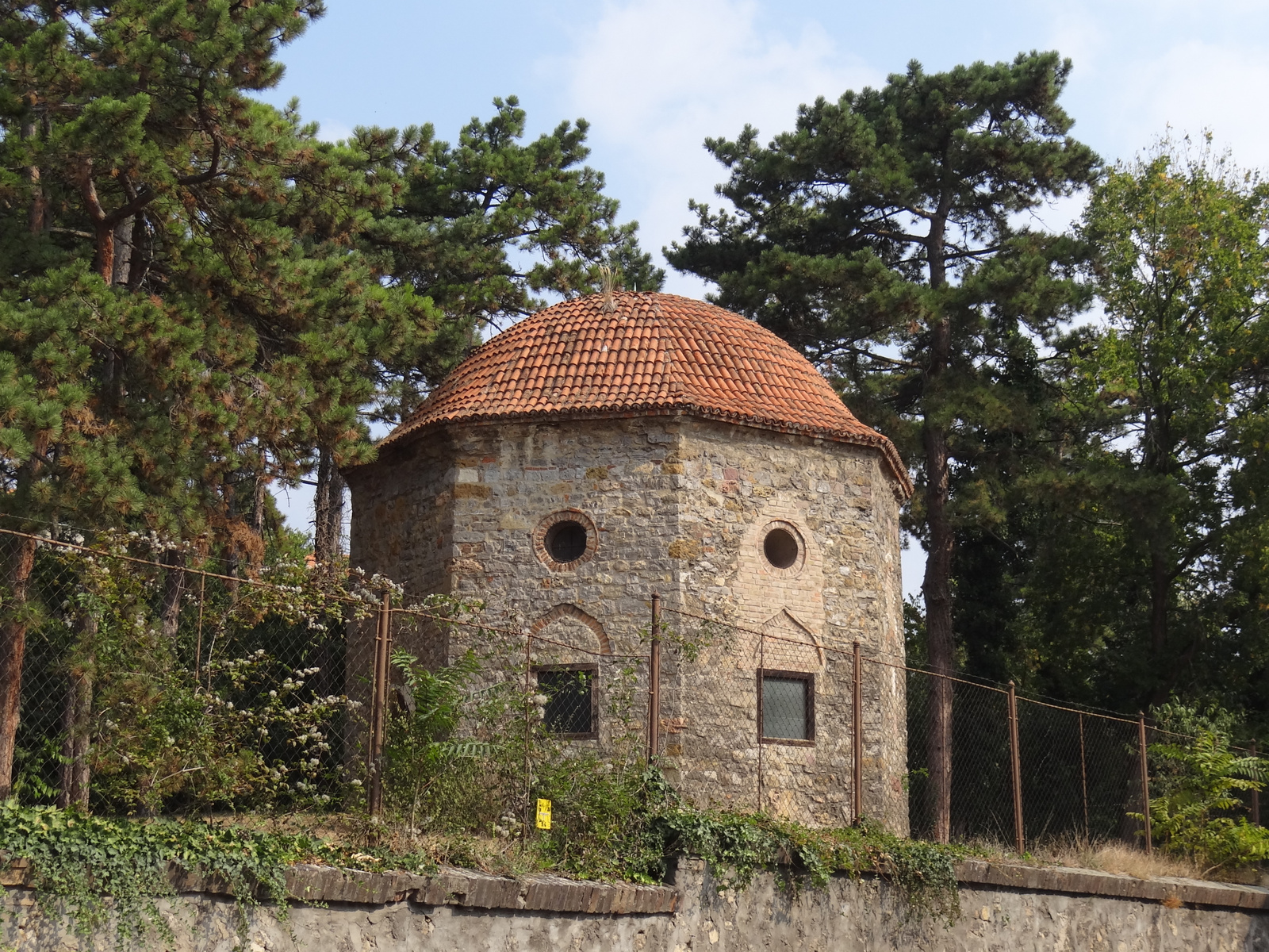 Idrisz Baba türbéje (Pécs, Nyár u. 8.) This is a photo of a monument in Hungary, Identifier: 1780